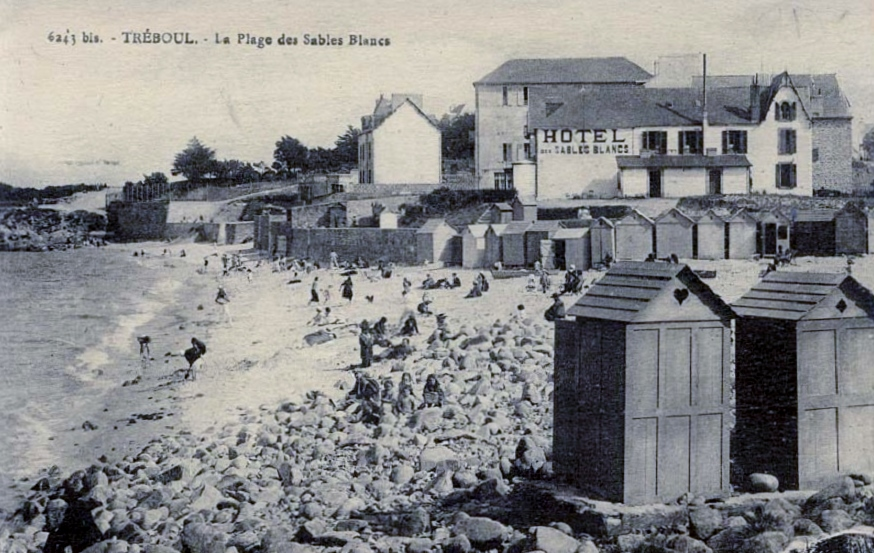 Tréboul : la plage des Sables blancs au début du XXe siècle (carte postale ND photo)